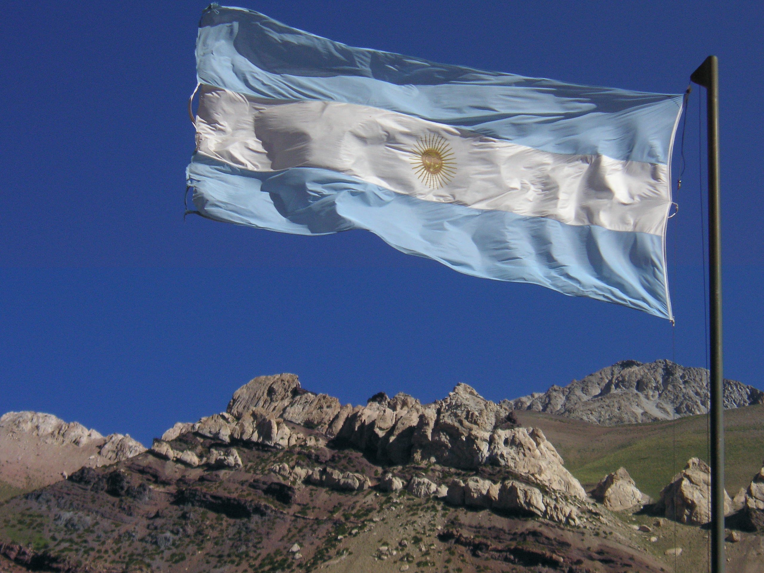 Bandera de Argentina en los Andes, frontera entre Chile y Argentina.